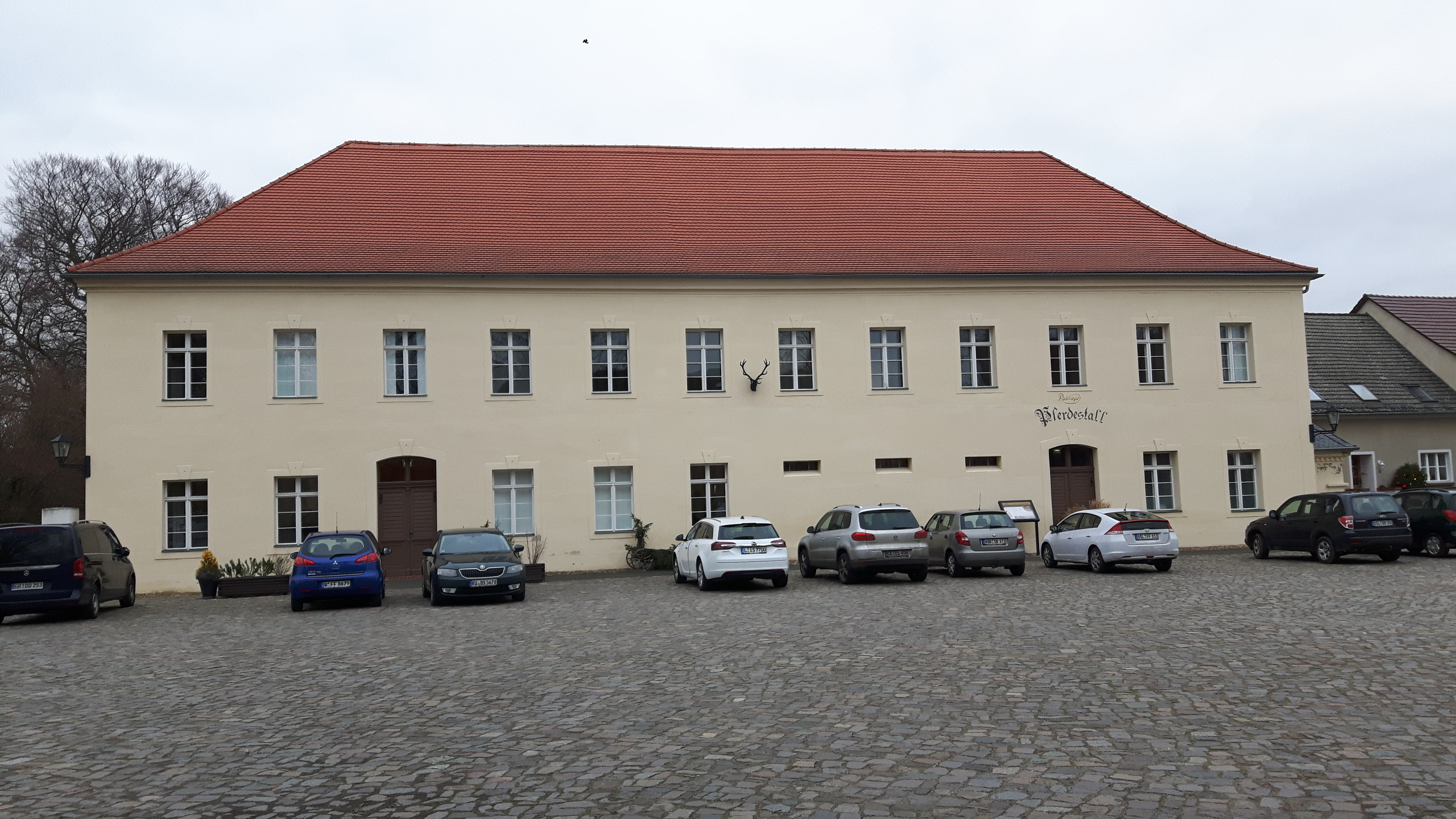 Das Amtshaus des Wasserschlosses Fürstlich Drehna wurde in der zweiten Hälfte des 18. Jahrhunderts errichtet. Der zweigeschossige Putzbau wurde früher als Pferdestall benutzt. Zwischen 1997 und 2007 wurde das Amtshaus saniert und wird seitdem als Hotel genutzt.